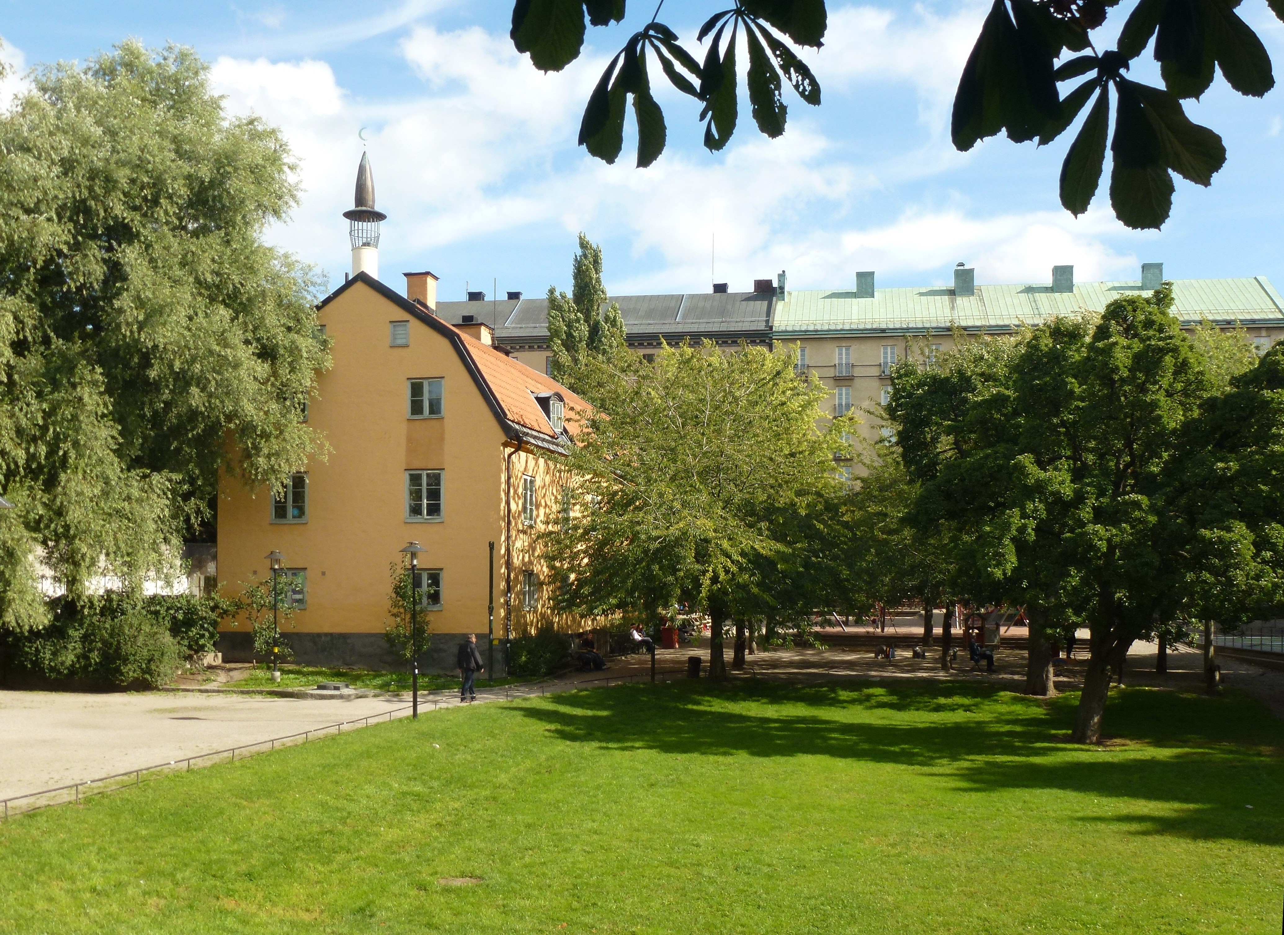 Björns trädgård med Björns malmgård, norr härom låg Pelarbacken